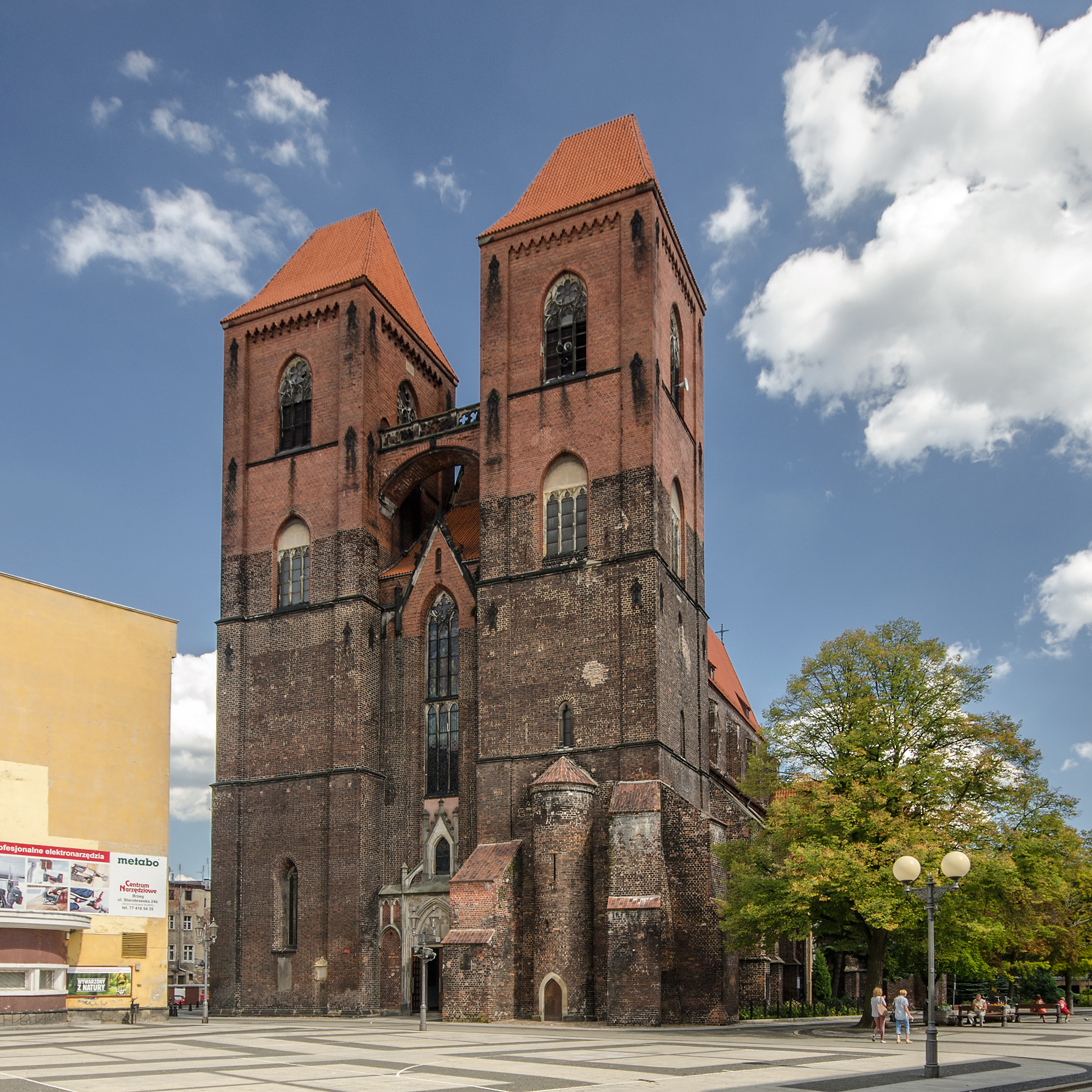 Brzeg, kościół par. p.w. św. Mikołaja, 1370, 1409-1416, XIX, 1959